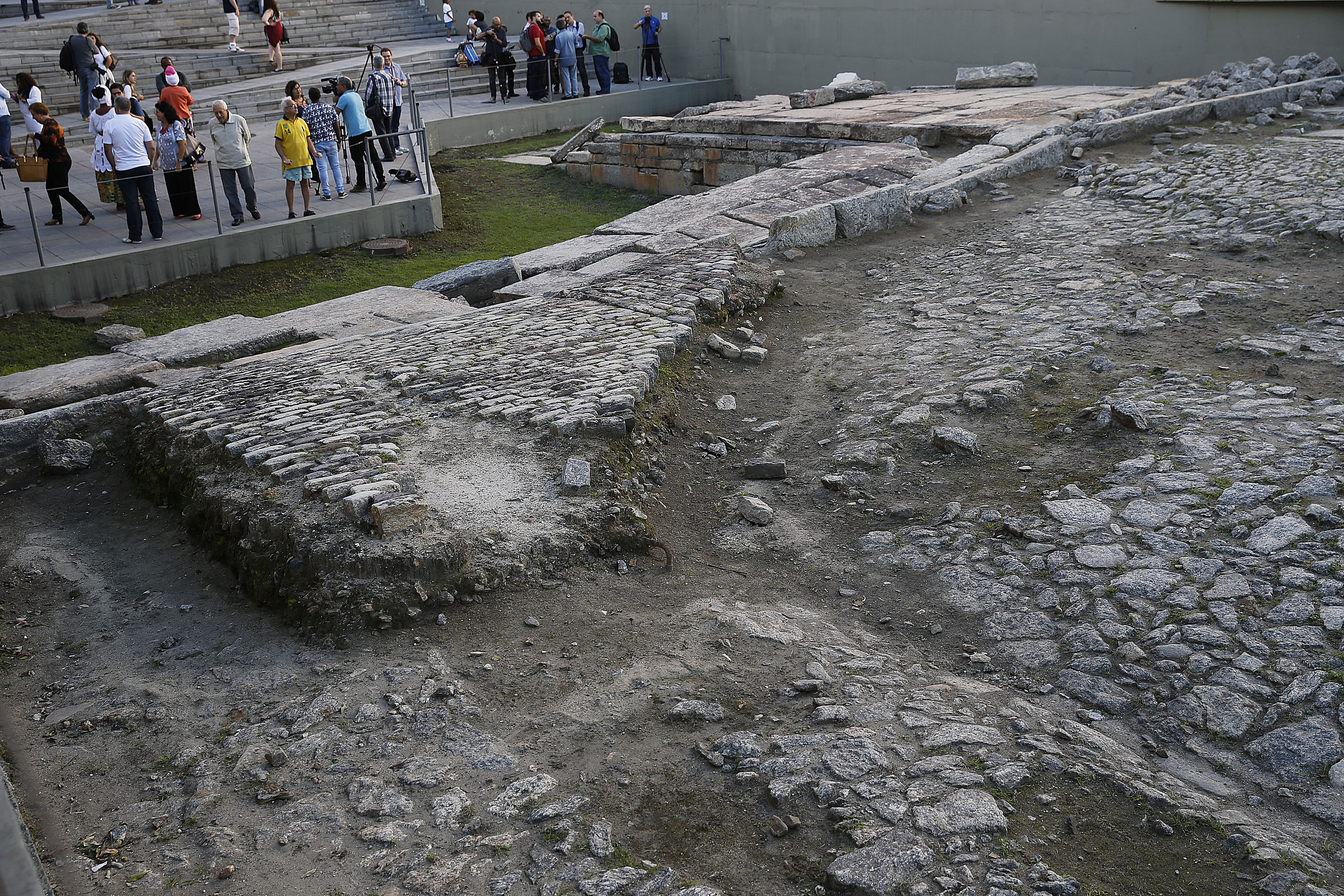 Rio de Janeiro - O Cais do Valongo, principal porto de entrada de escravos nas Américas é reconhecido como Patrimônio da Humanidade pela Unesco (Fernando Frazão/Agência Brasil).